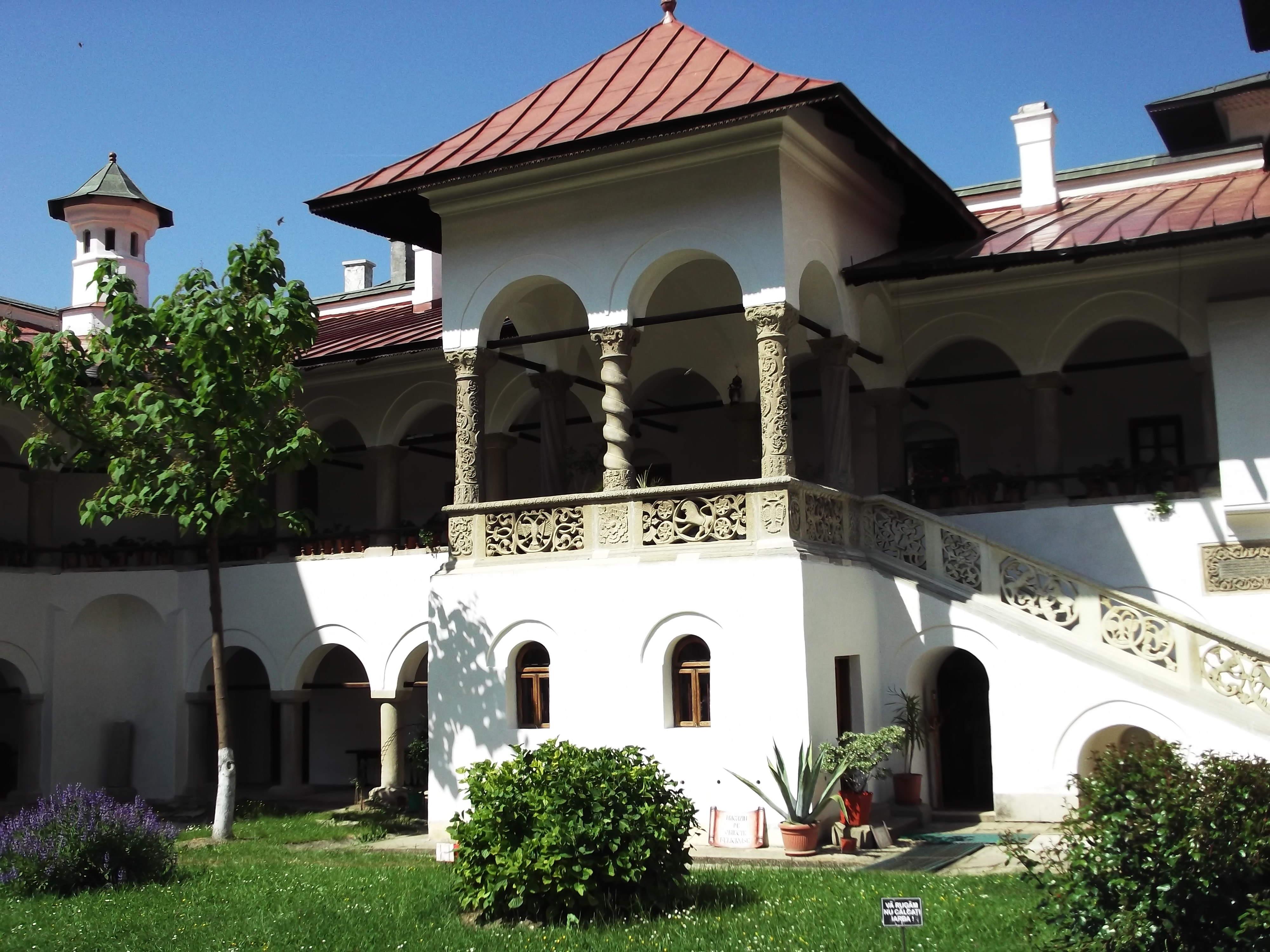 Mănăstirea Horezu - Palatul Domnesc 03